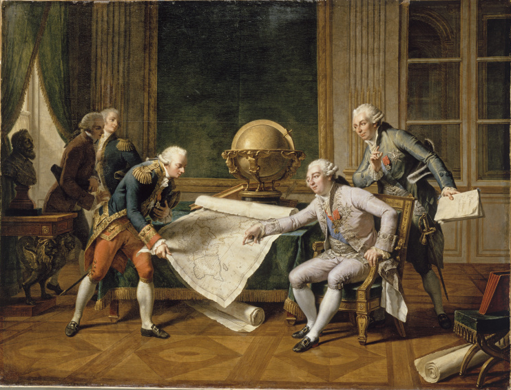 Louis XVI donnant des instructions à La Pérouse, le 29 juin 1785